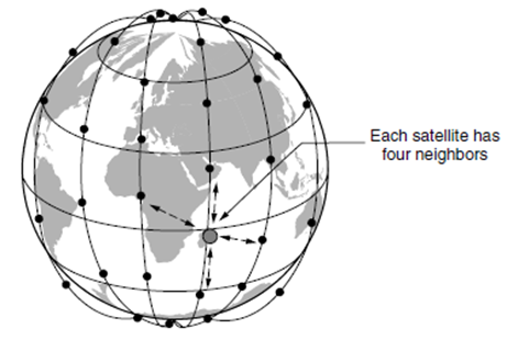 İridium peykləri yer üzərində 6 dairəvi halqa əmələ gətirir